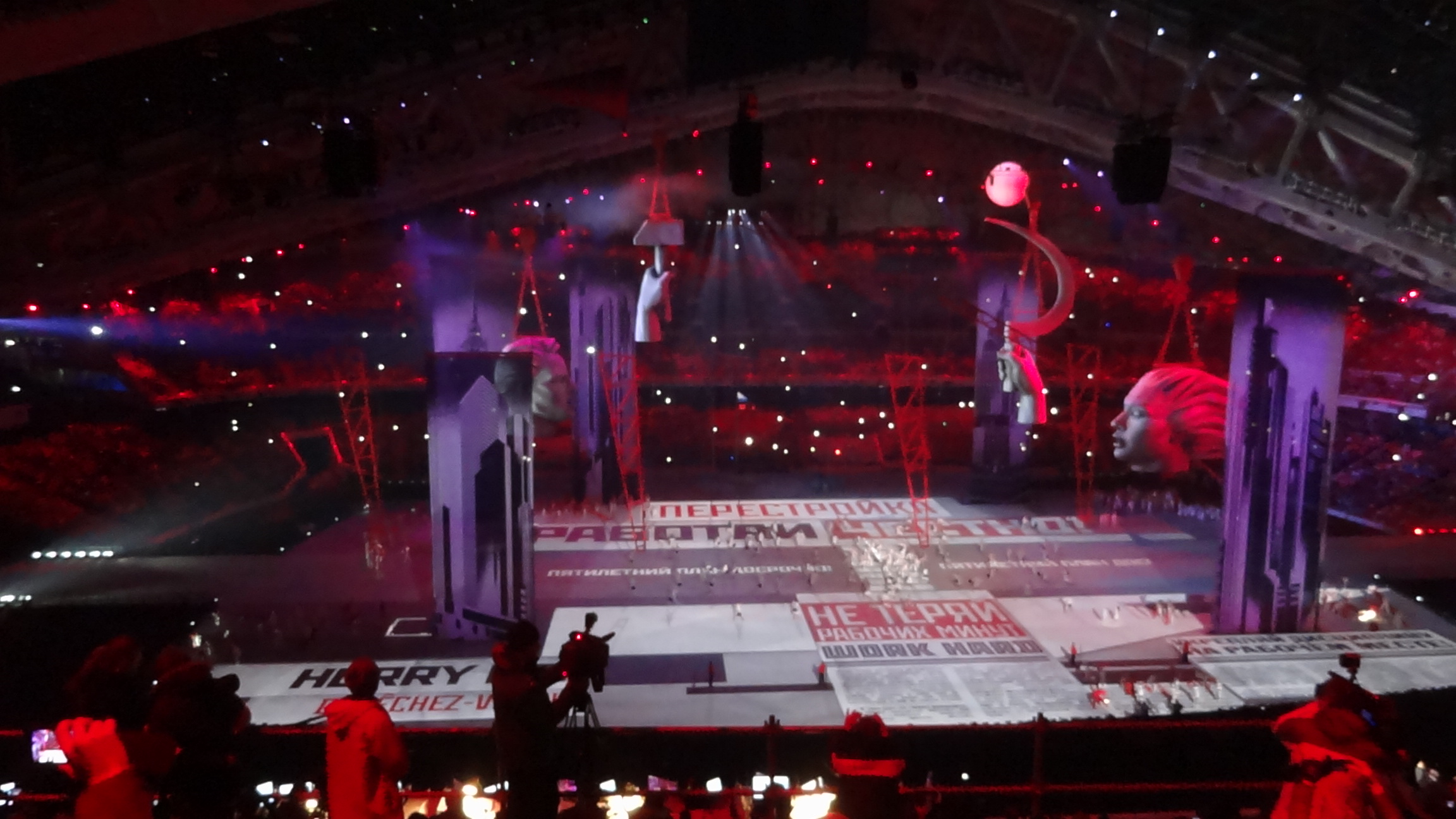 На Церемонии открытия XXII зимних Олимпийских игр в Сочи. 7 февраля 2014 года.